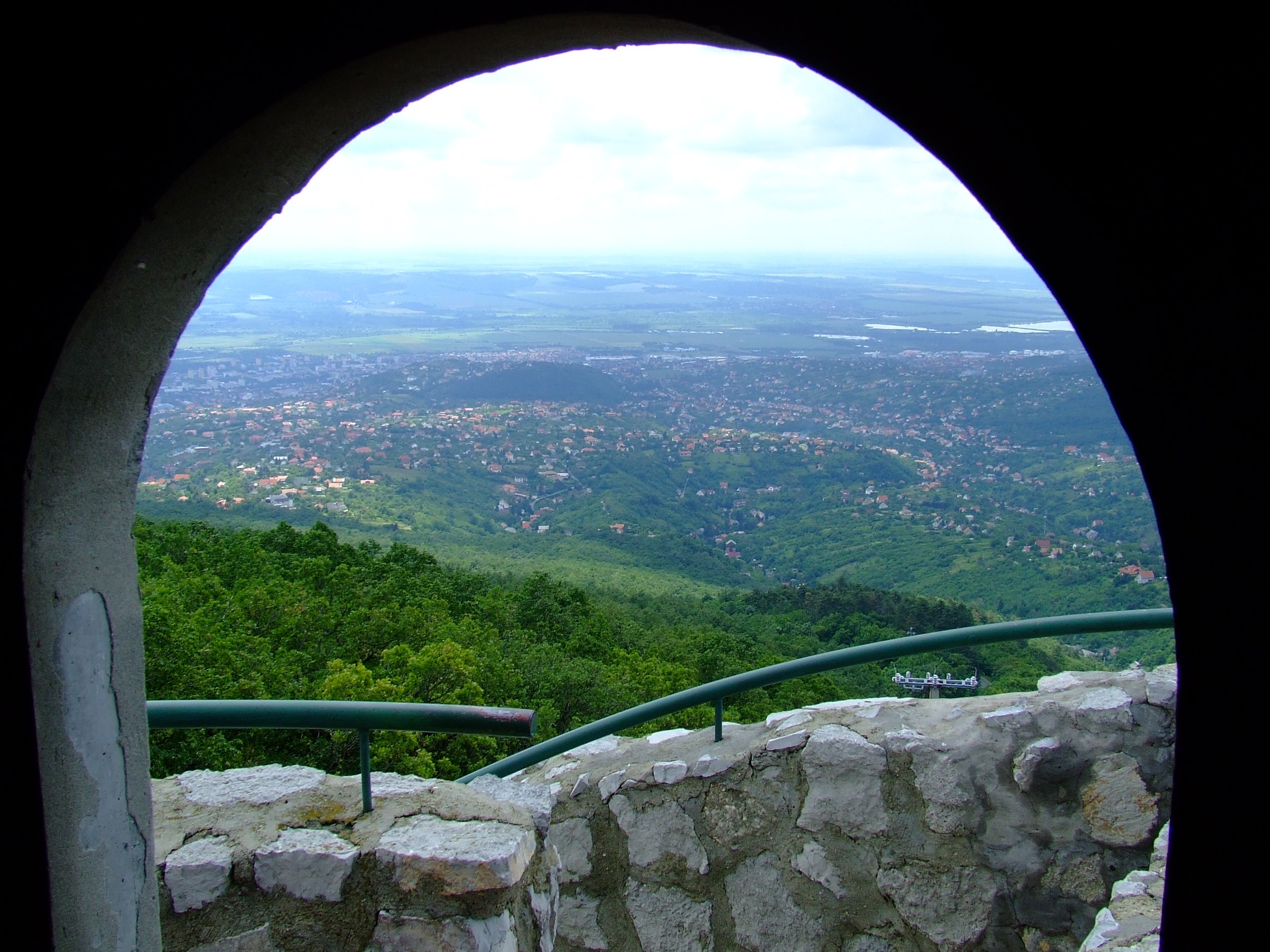 Kilátás a János-kilátó középső szintjéről